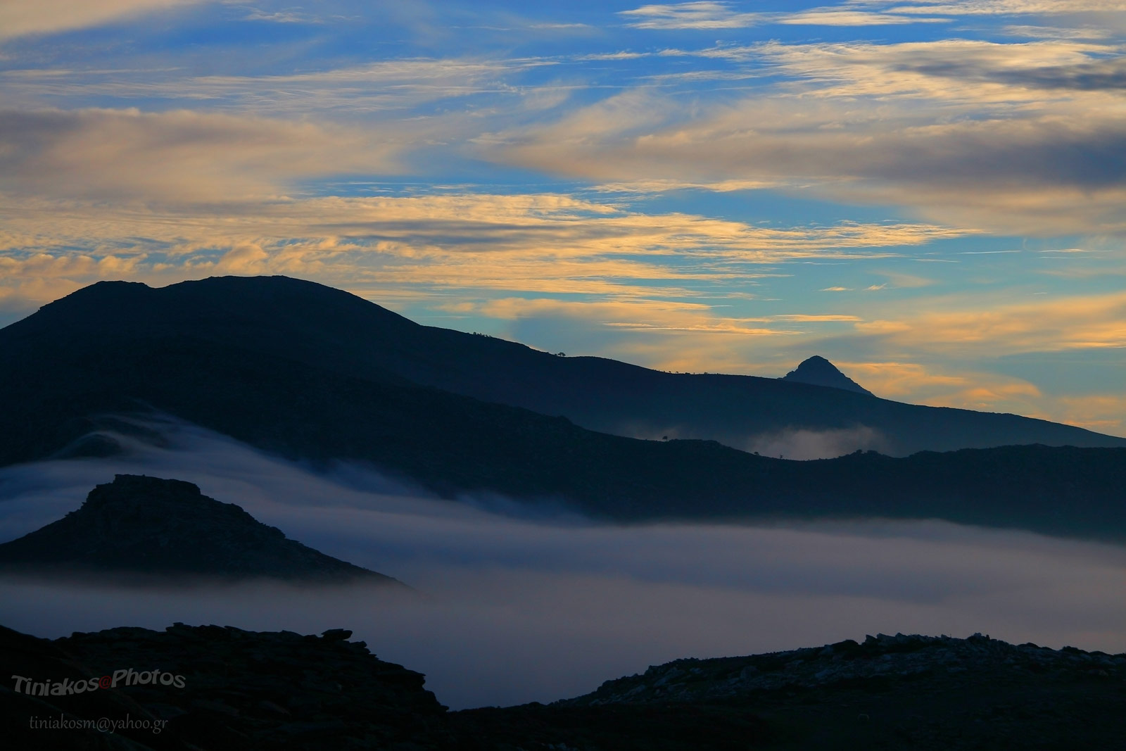 Ikaria's sunset 2006